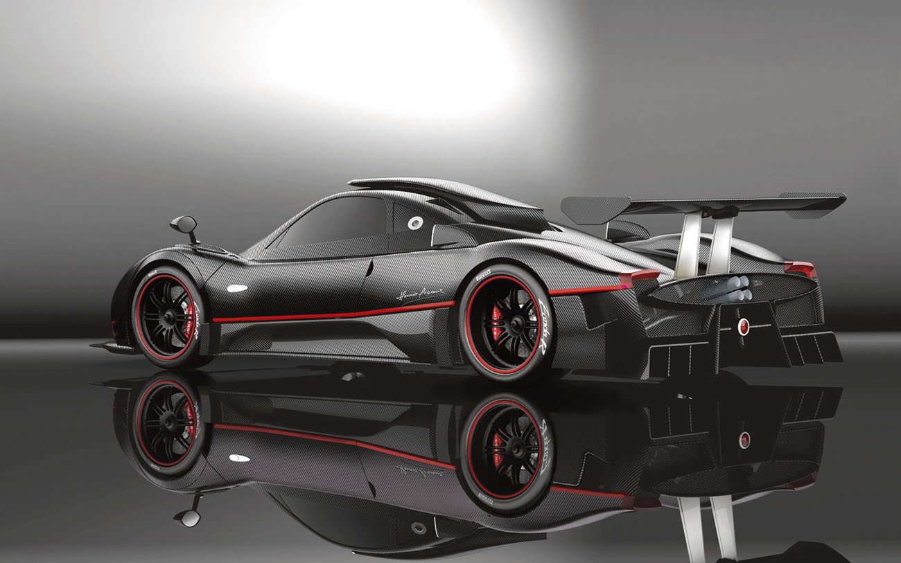 Pagani Zonda R, vista posteriore